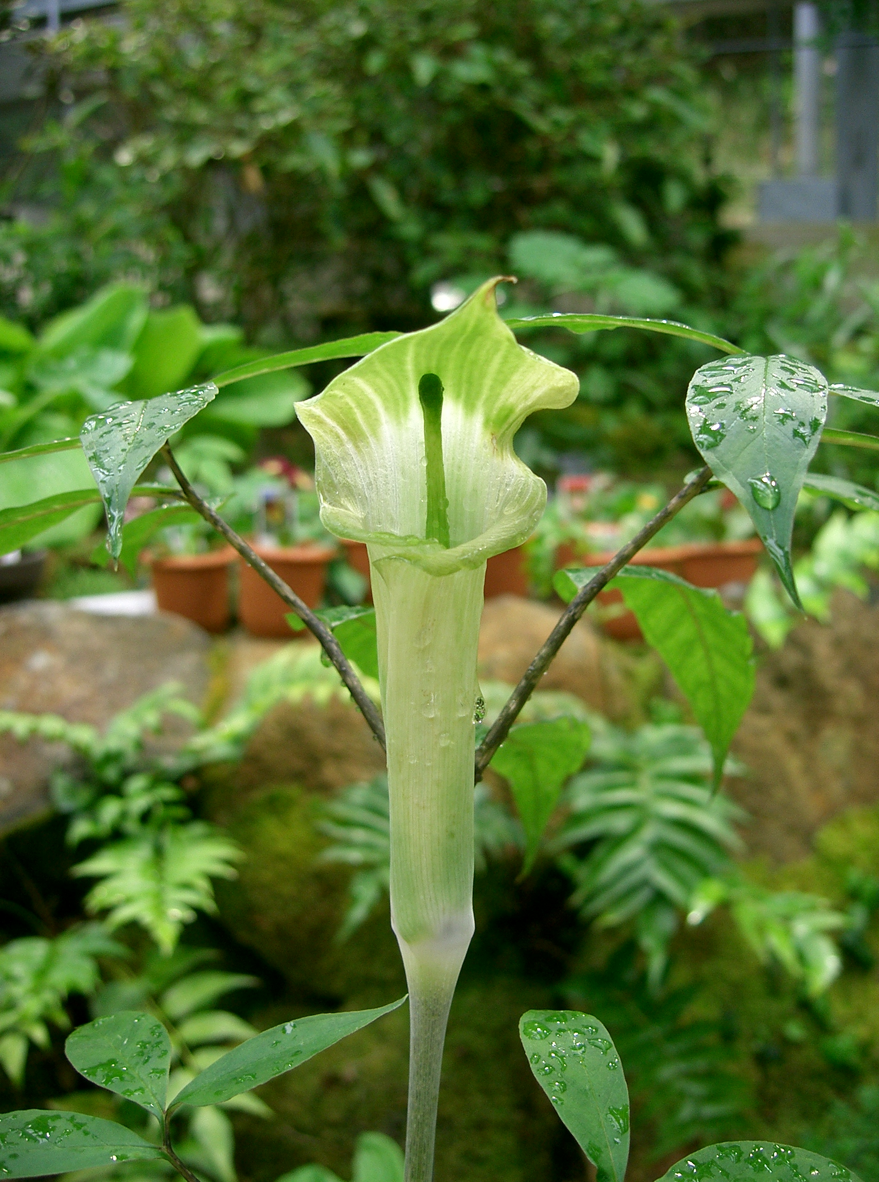 Scientific name Arisaema yamatense